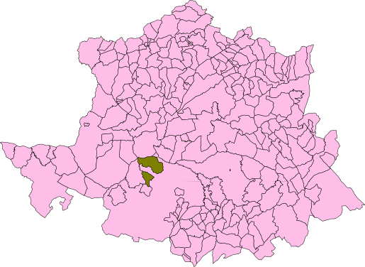 Casar de Cáceres